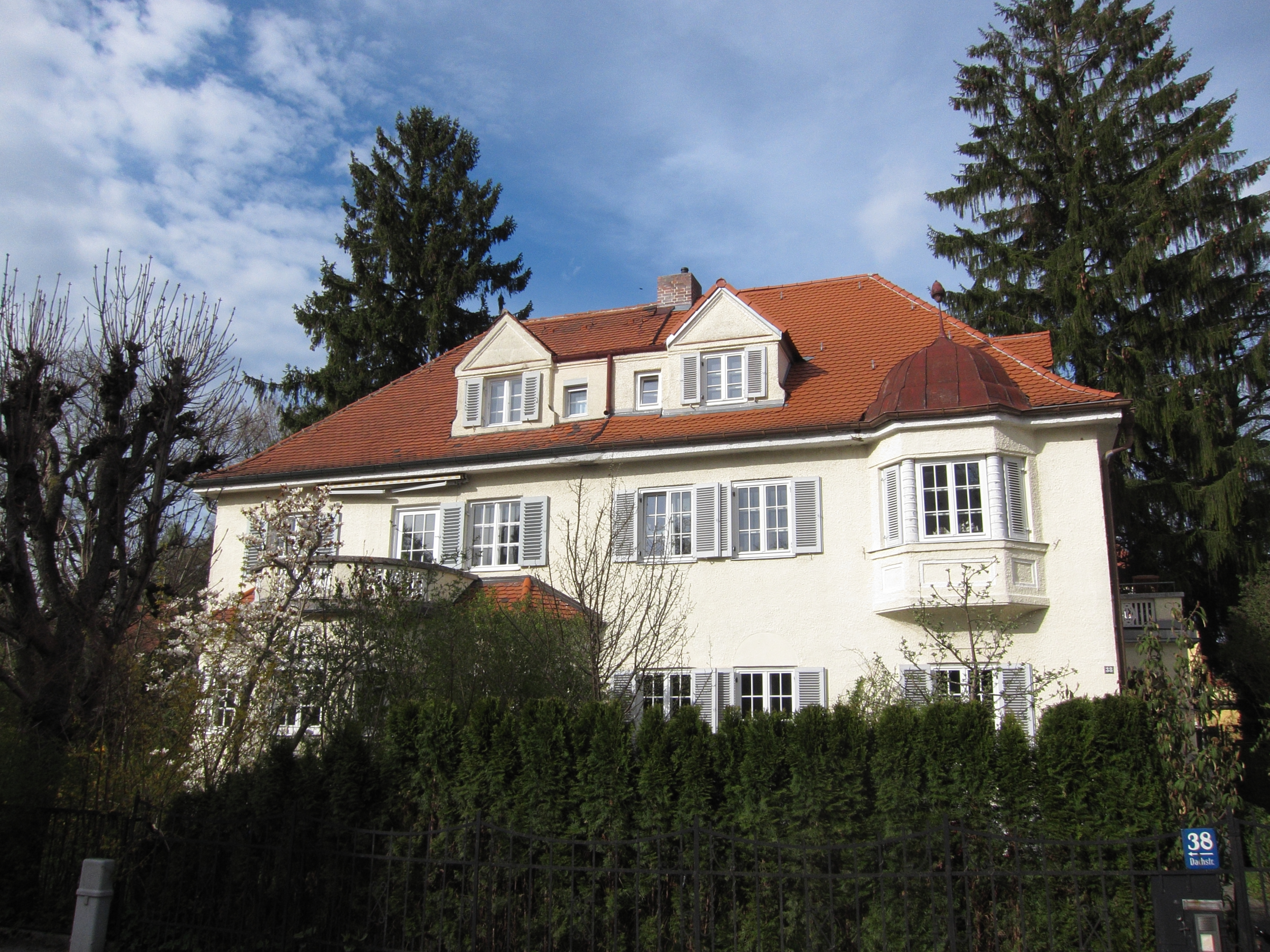 Dachstraße 38/40; Doppelvilla, Walmdachbau mit Erkern, Spätjugendstil, 1913 von den Gebrüdern Ott.